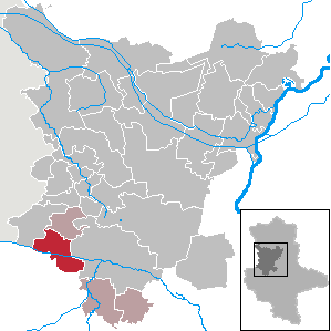 Am Großen Bruch in Saxony-Anhalt (Country) - District (Landkreis) Börde